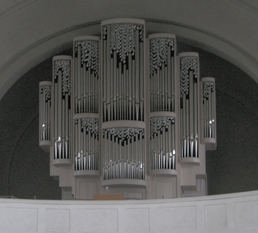 St.-Jakobus-Kirche in Mannheim